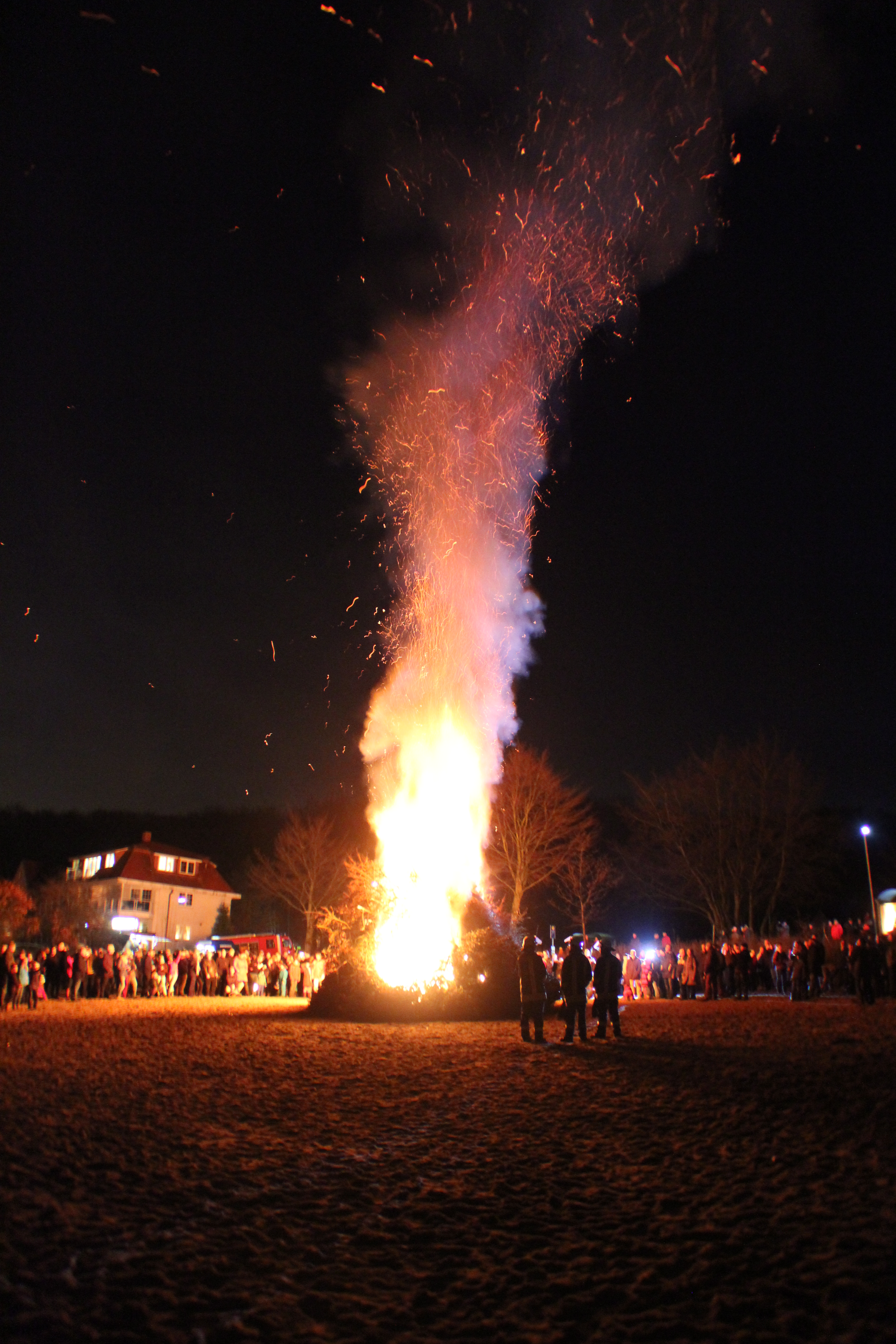 Biikebrennen in Wassersleben (2014), nach der Entzündung